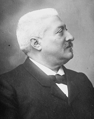 French Prime Minister Ernest Monis (1846 - 1929)